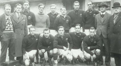 photo de l'équipe du FC Rouen pour la saison 1933-1934